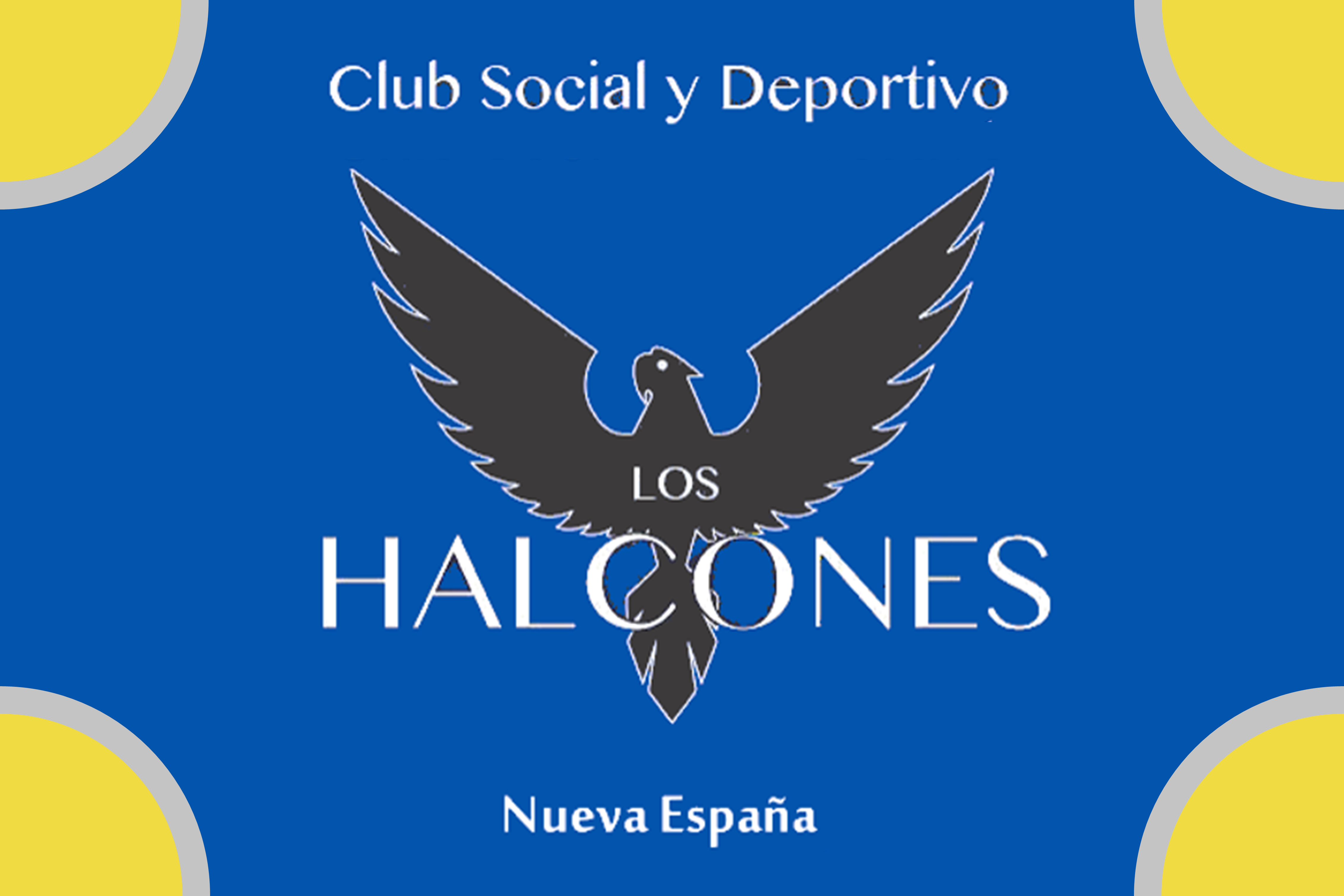 Recreación no oficial y personal de la bandera de Los Halcones